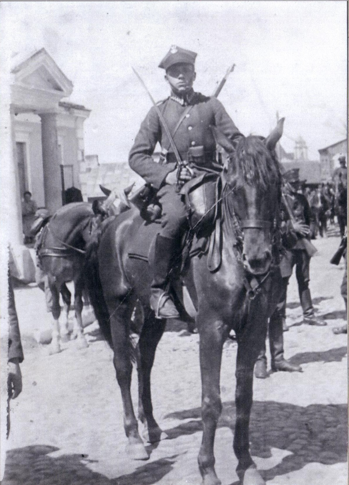 Жителі Черничина в Польському Війську.А.Вашкевич 2 полк важкої артилерії.Парад в Холмі 1937р.